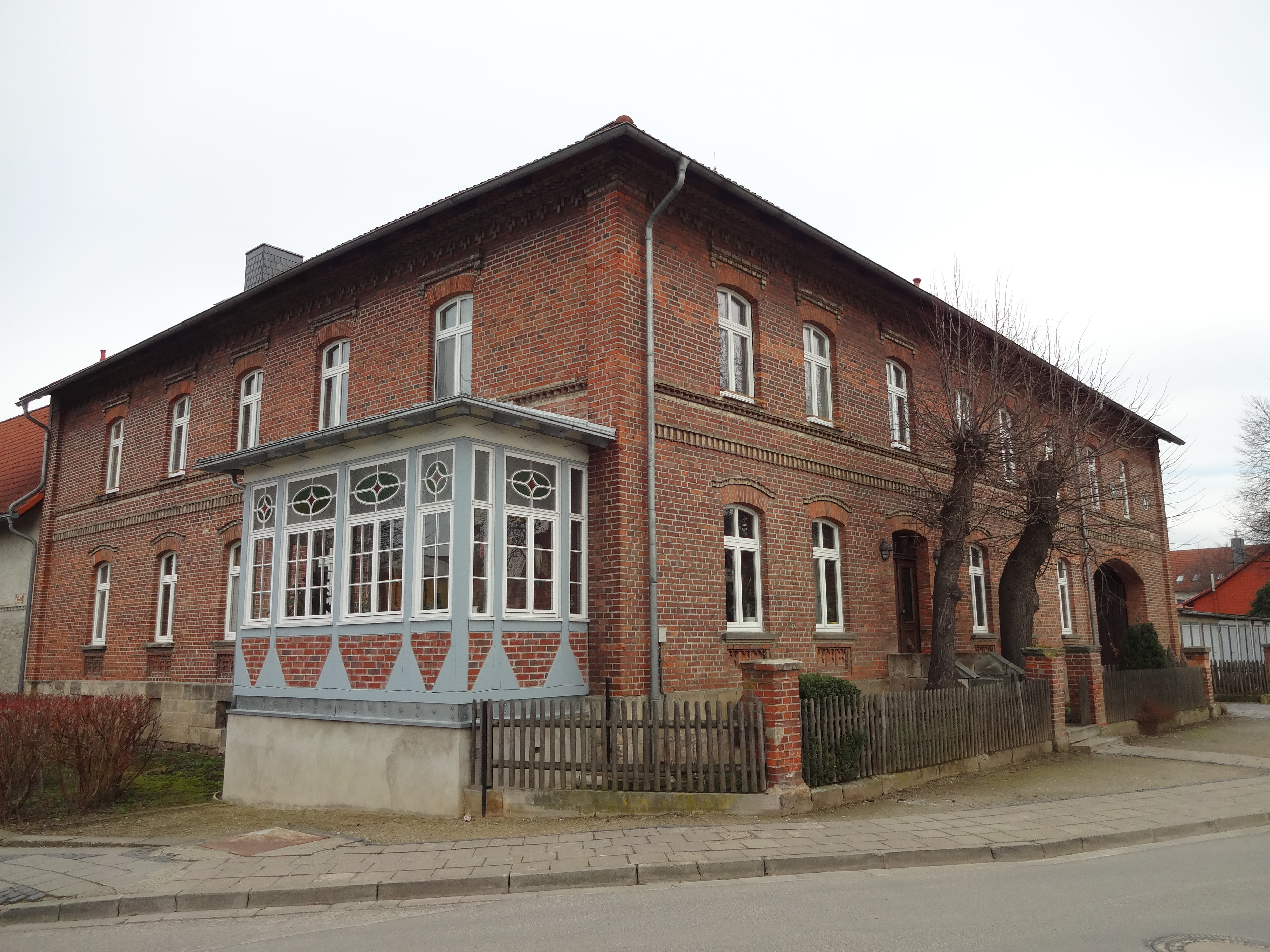 denkmalgeschützter Gutshof in der Promenade 5 in Derenburg, Ortsteil von Blankenburg (Harz)